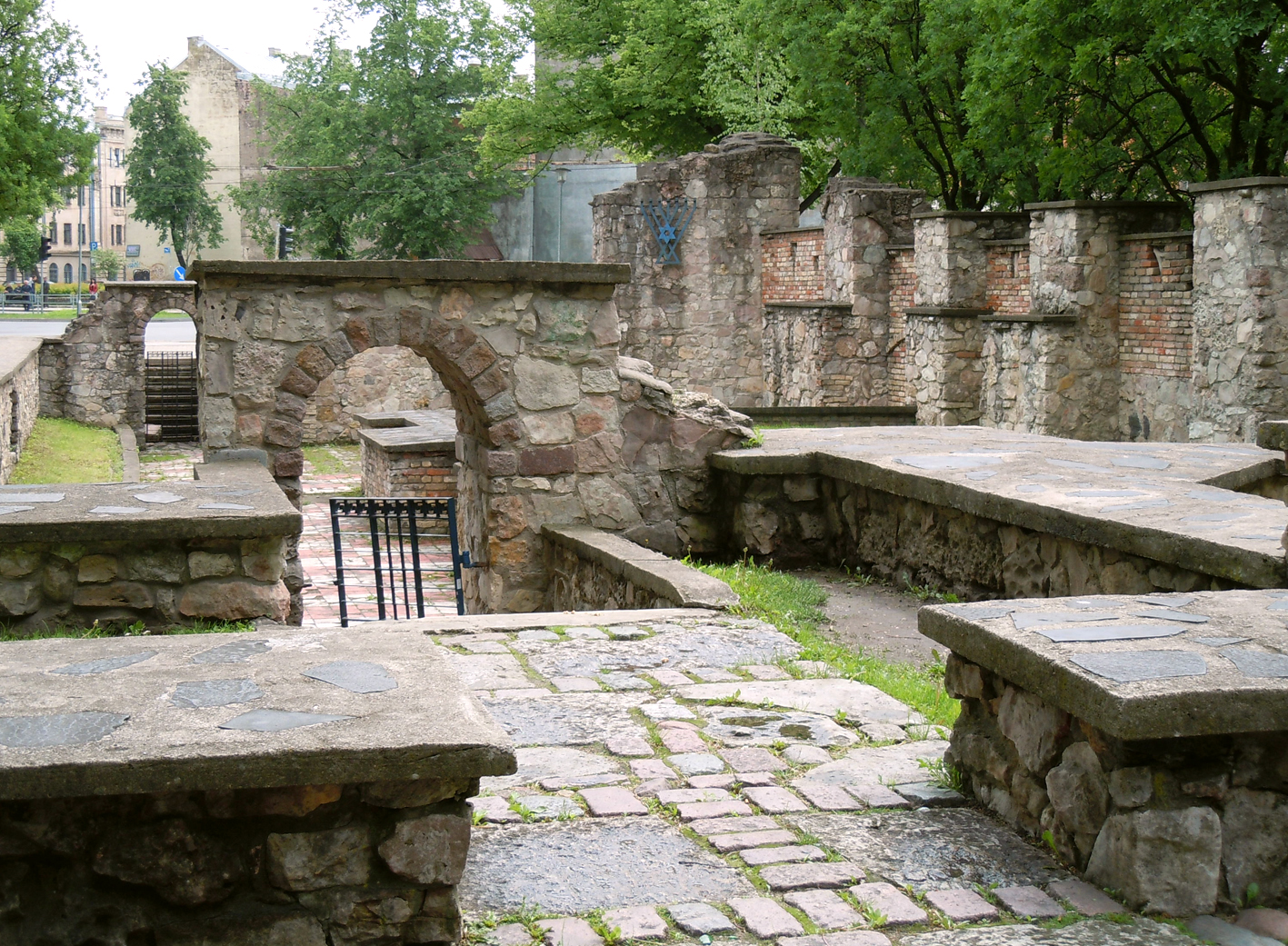 Memorial.Choral Synagogue (Riga)